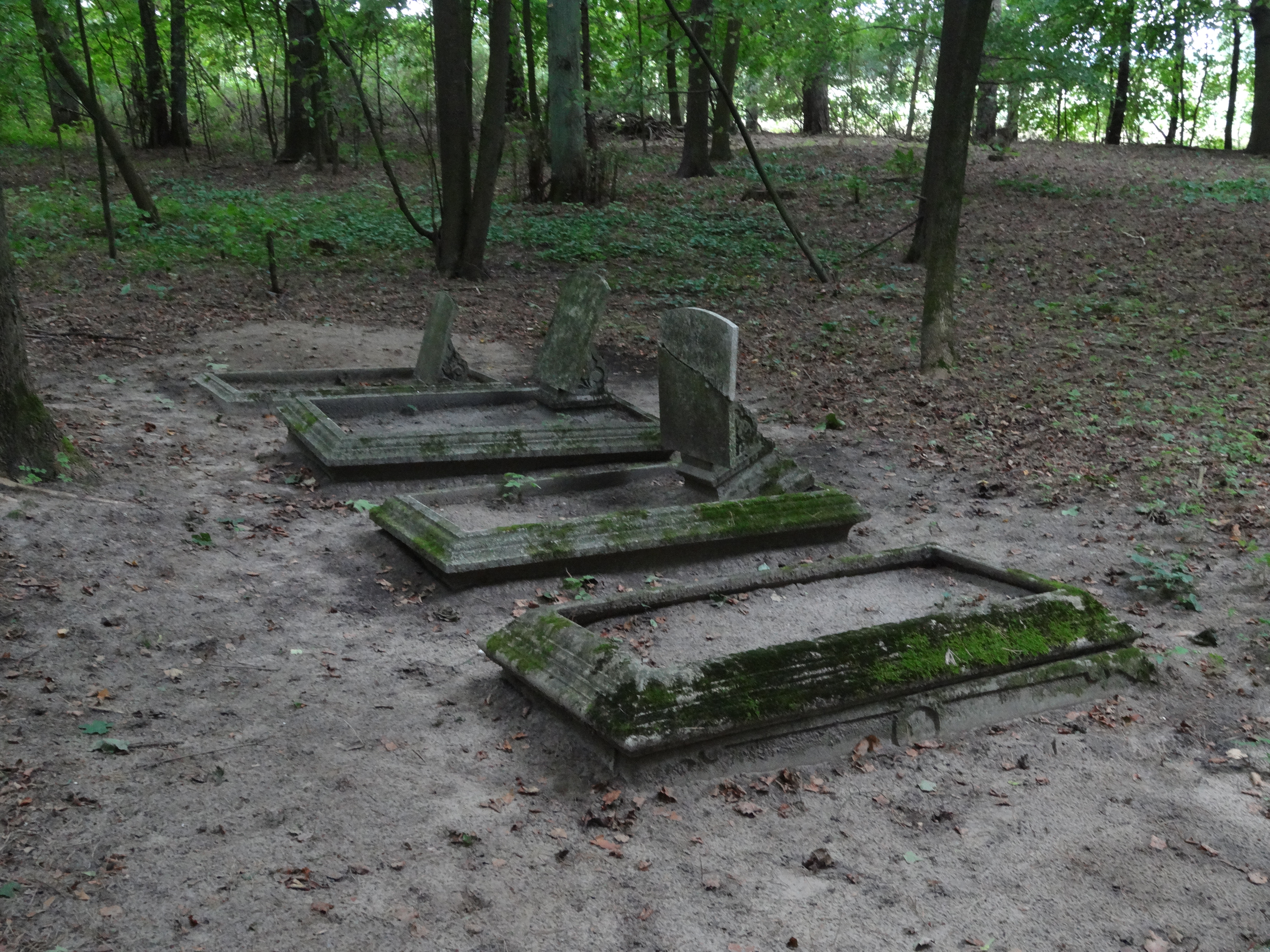 Stary cmentarz w Zdorach